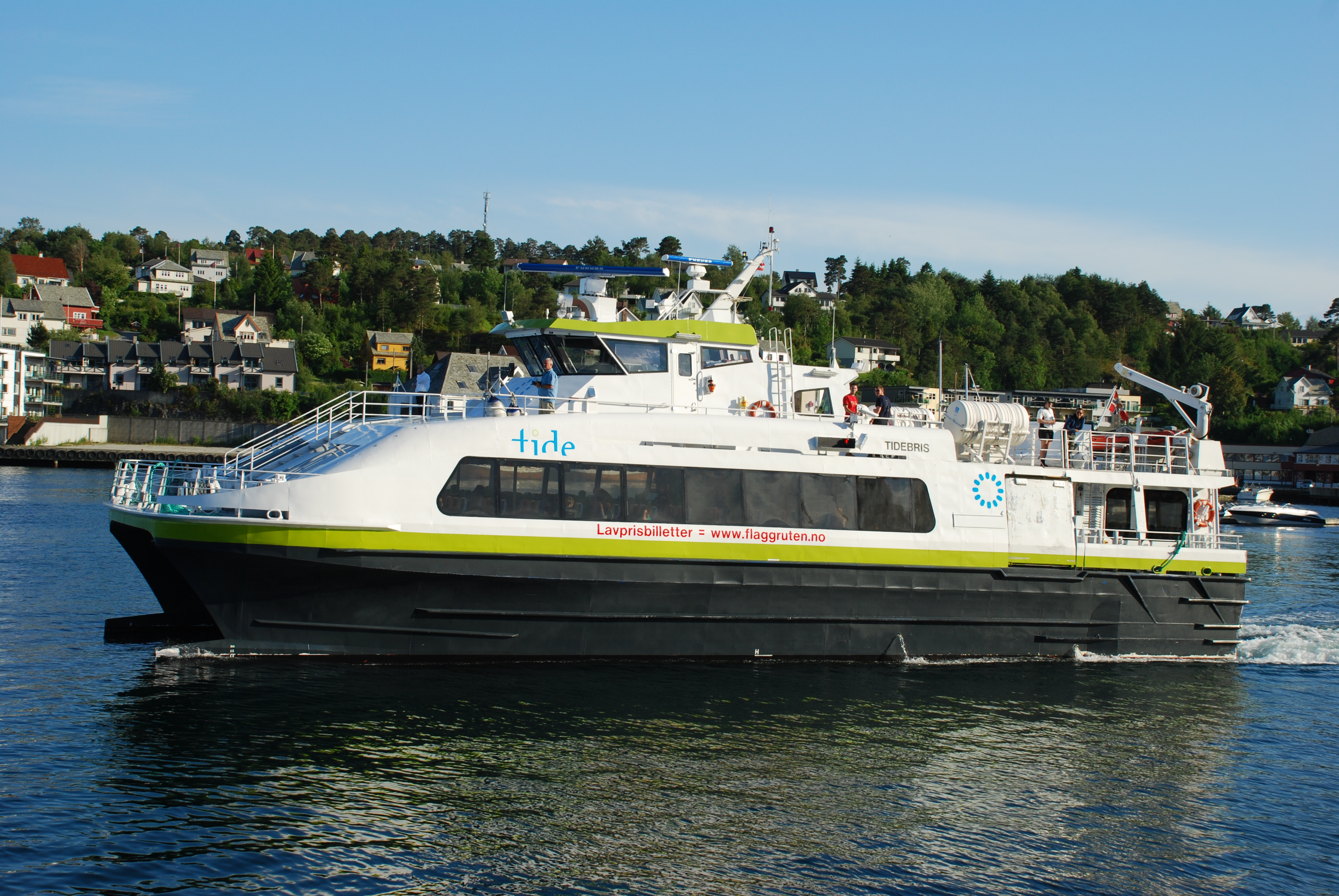 MS Tidebris i Flaggruten ved Leirvik. Foto Harald Sætre.